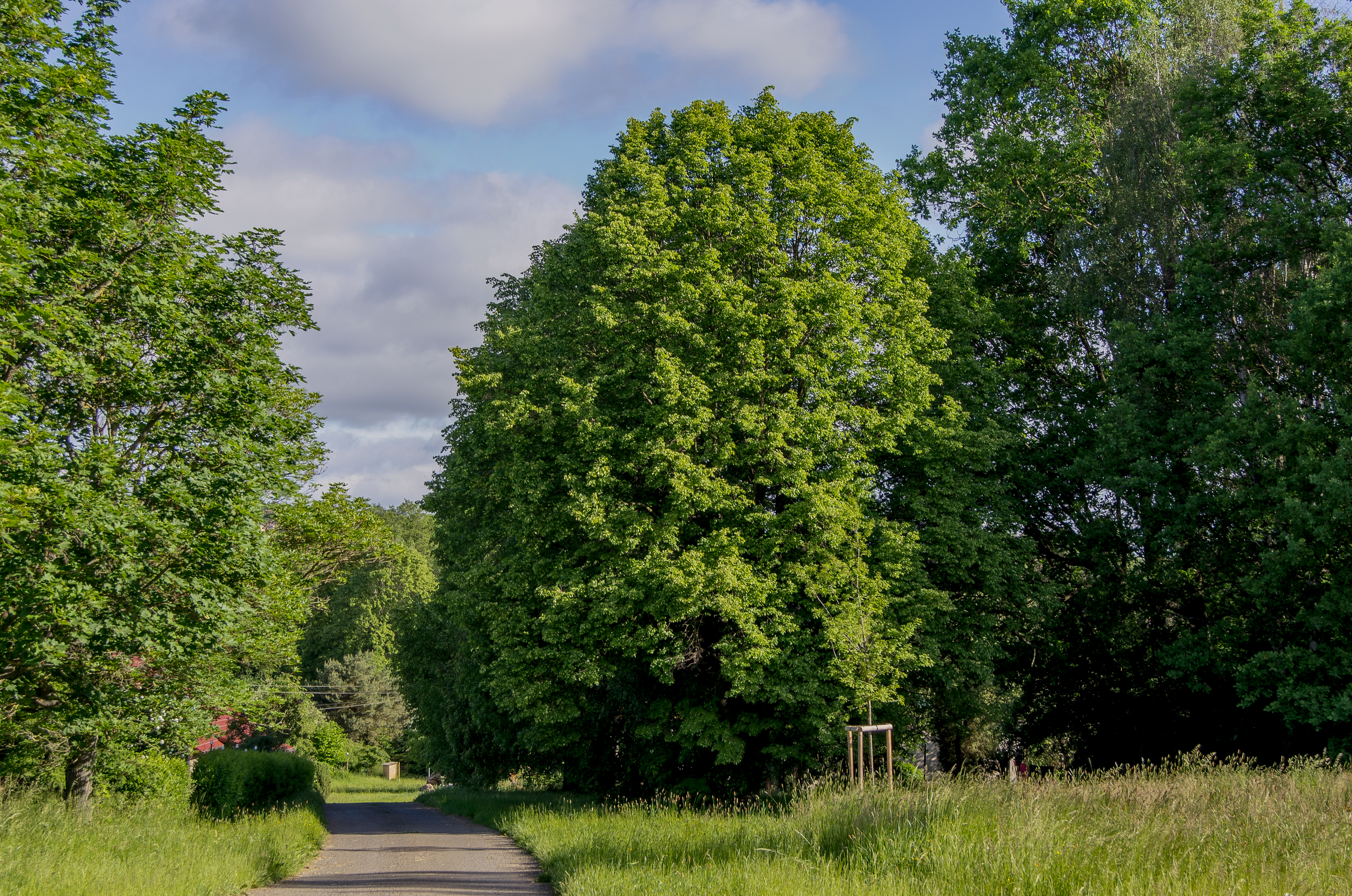 Želčanská Alej republiky v roce 2016